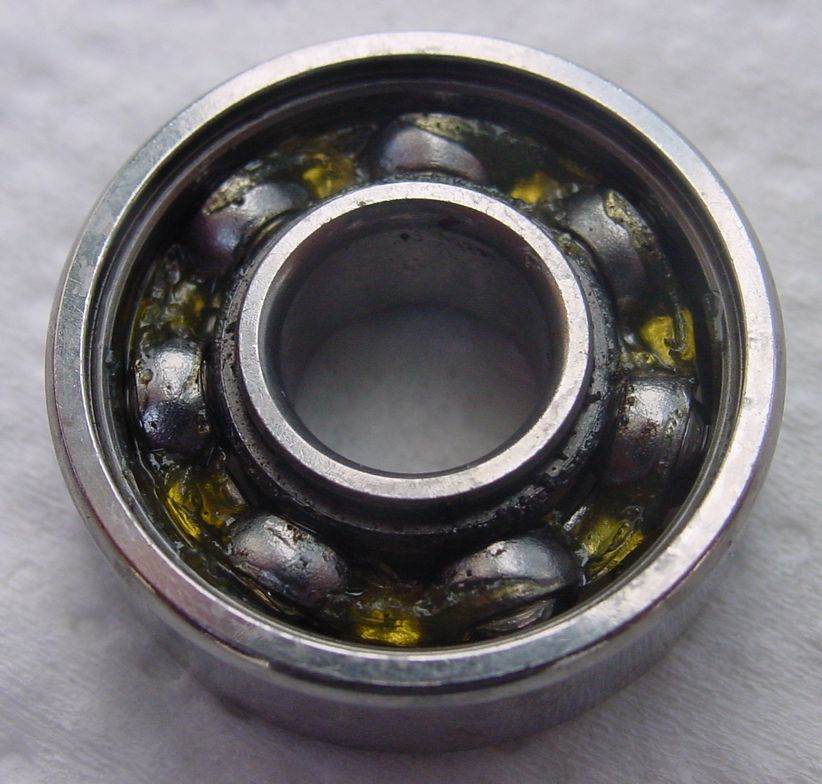 Kugellager (ABEC-3 von Inlineskates)